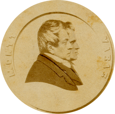 Manuel Montt Torres y Antonio Varas de la Barra